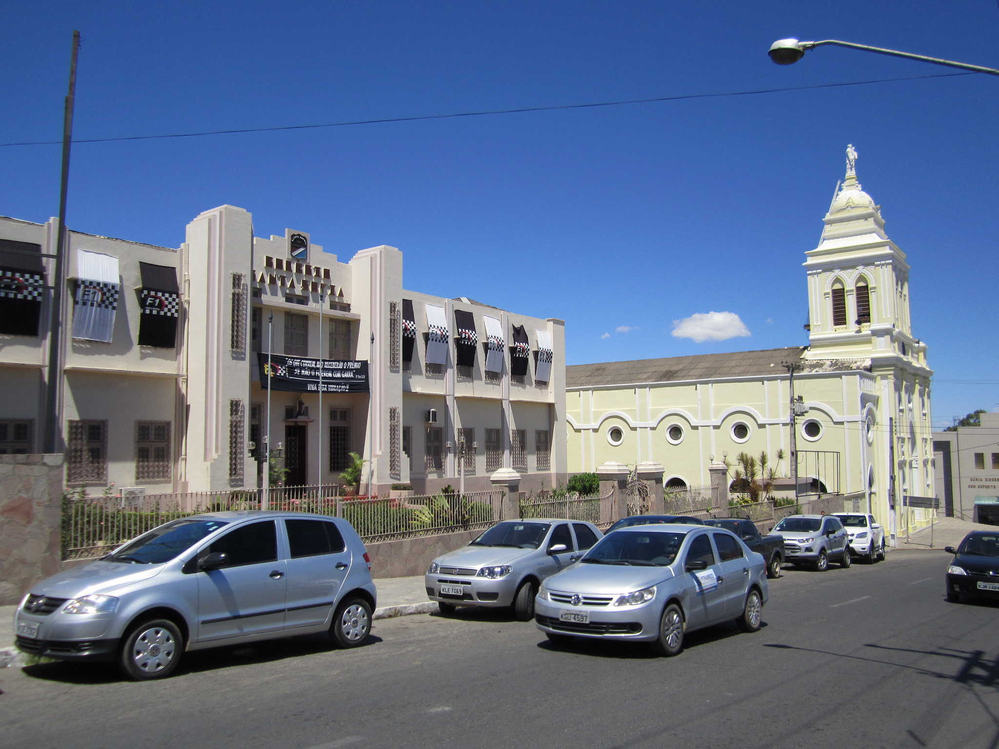 Colégio Santa Sofia e Igreja Matriz de Santo Antônio - Garanhuns, Pernambuco, Brasil